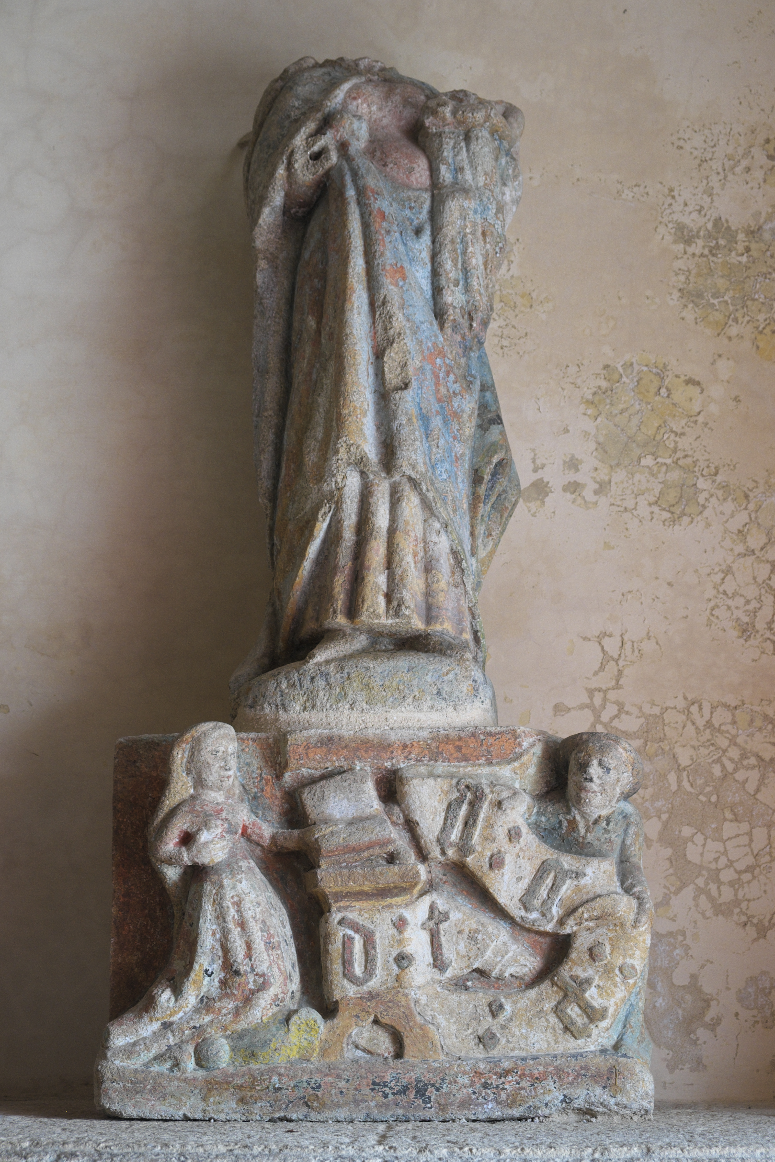 Katholische Pfarrkirche Ste-Trinité (Dreifaltigkeitskirche) in Calan im Département Morbihan (Region Bretagne/Frankreich), Madonnenfigur und Relief der Verkündigung